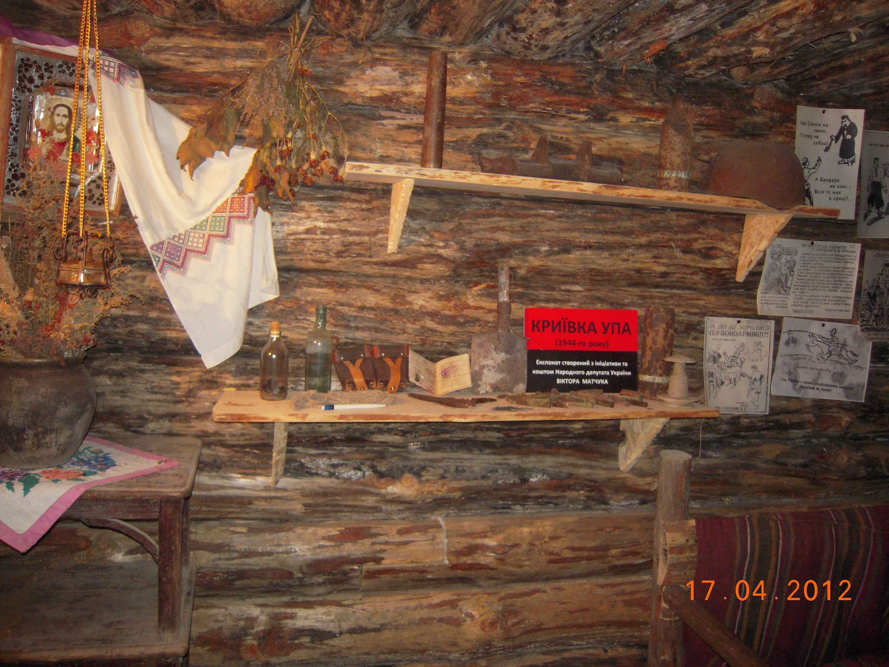 "Урочище Гурби", криївка УПА